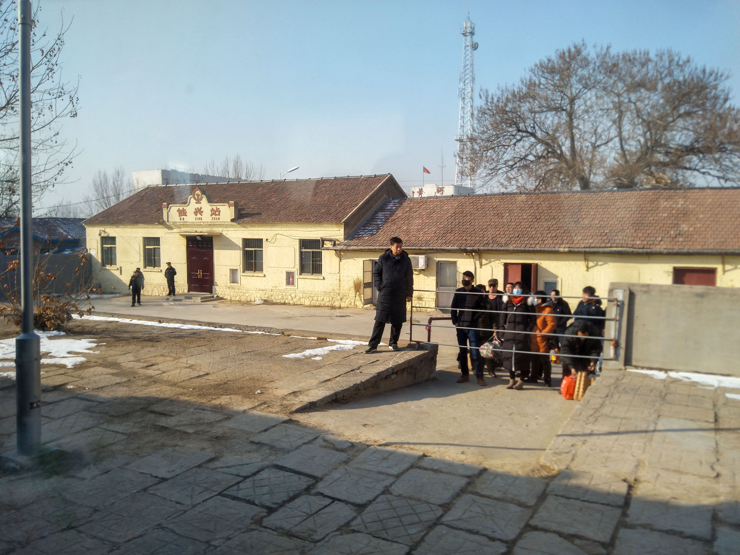 博兴火车站站房、站台与检票口